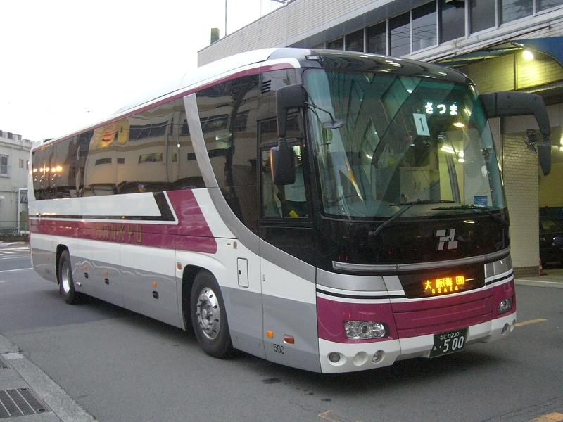 登録番号 なにわ200か・500 阪急観光バス所属 さつま号用 2007年5月1日 鹿児島中央駅前にて撮影